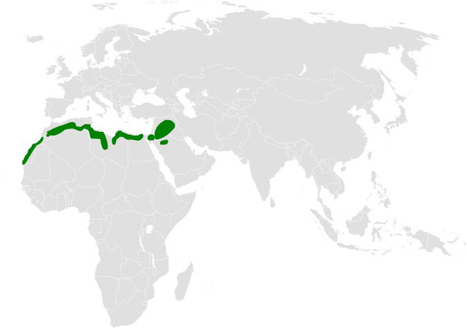 Eremophila bilopha distribution map, based on